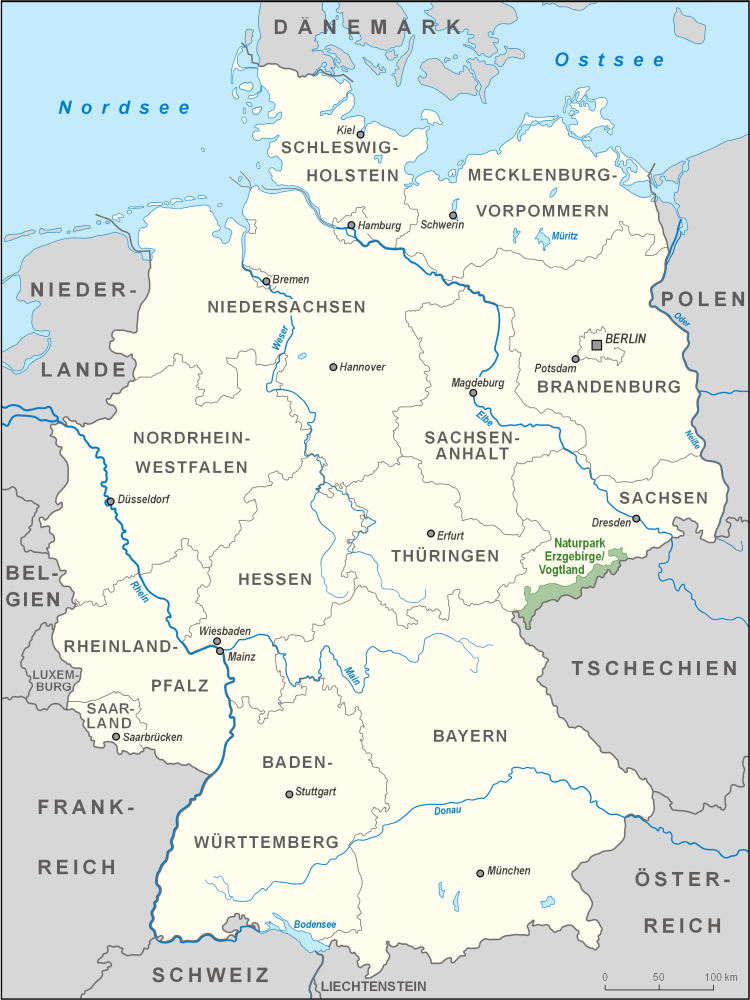 Karte des Naturparks Erzgebirge/Vogtland in Deutschland